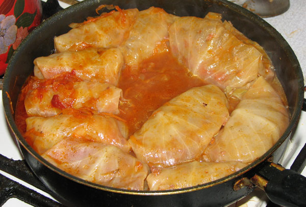 Голубцы